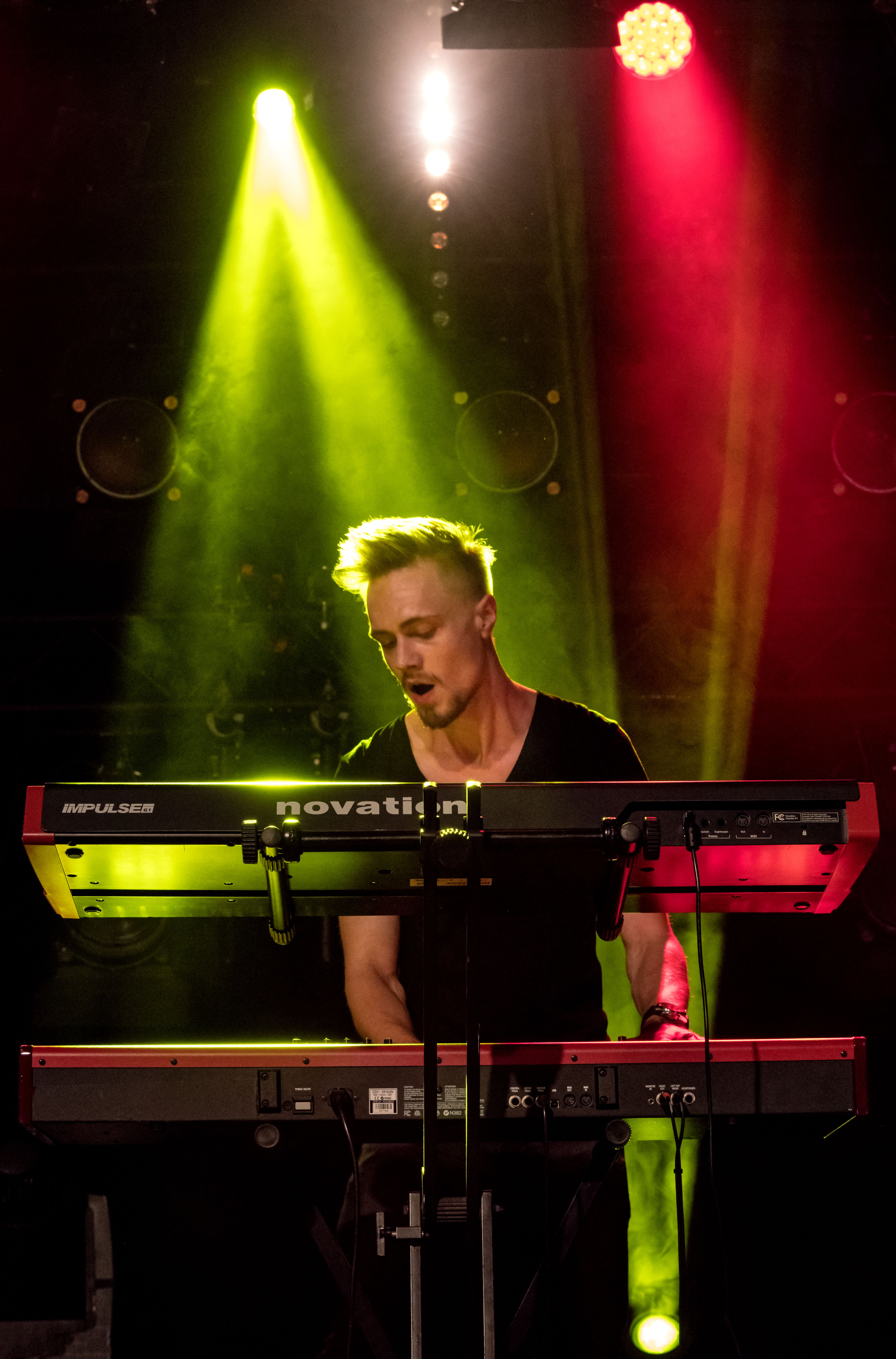 Bilder vom Zelt Musik Festival 2016 in Freiburg im Breisgau Wanda mt Ansa